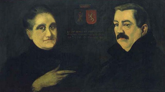 Retrato de los IX Condes de Priegue, oil on canvasmedium QS:P186,Q296955;P186,Q12321255,P518,Q861259, 52 cm x 92 cm